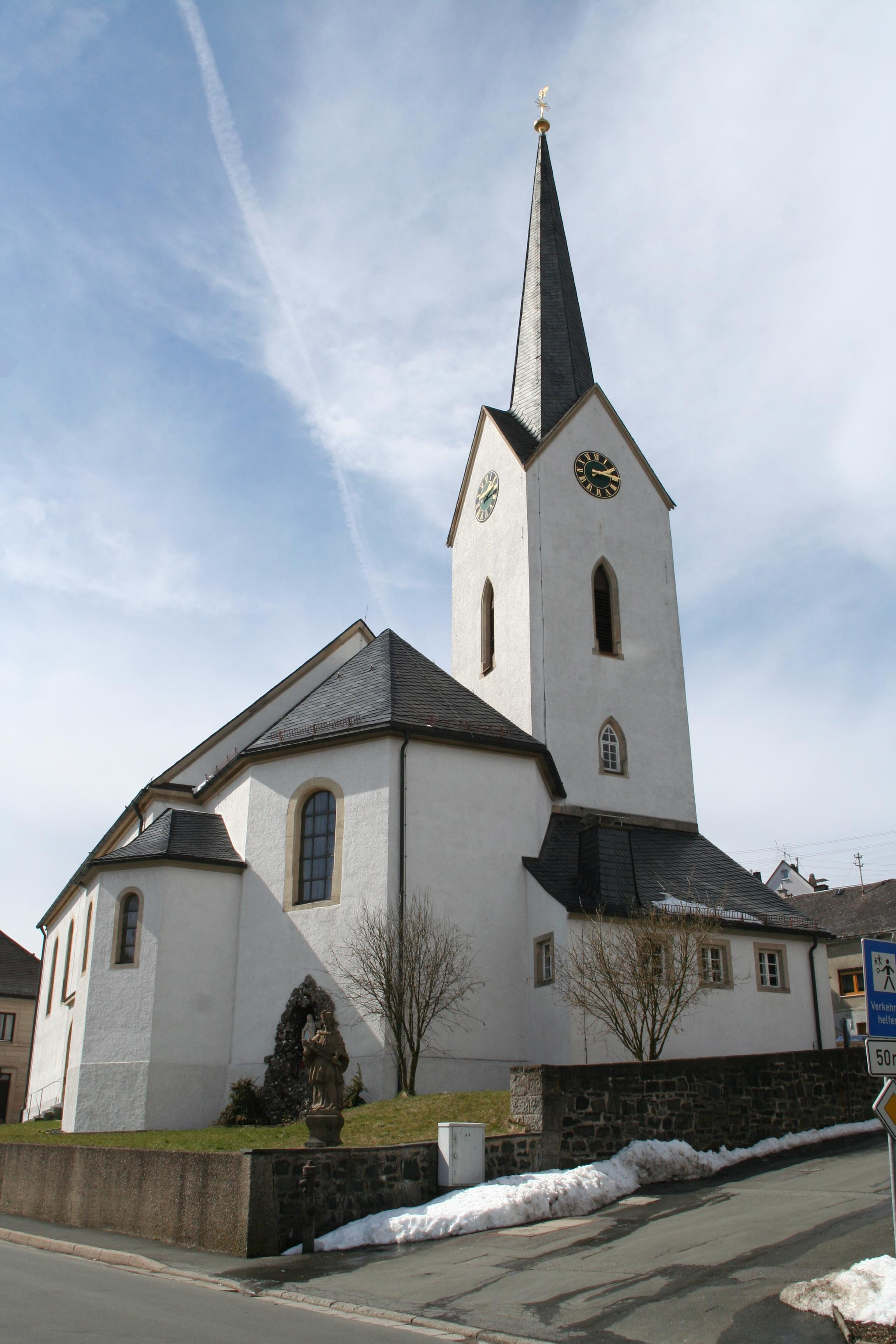 Nordhalben im Landkreis Kronach, Katholische Kirche St. Bartolomäus